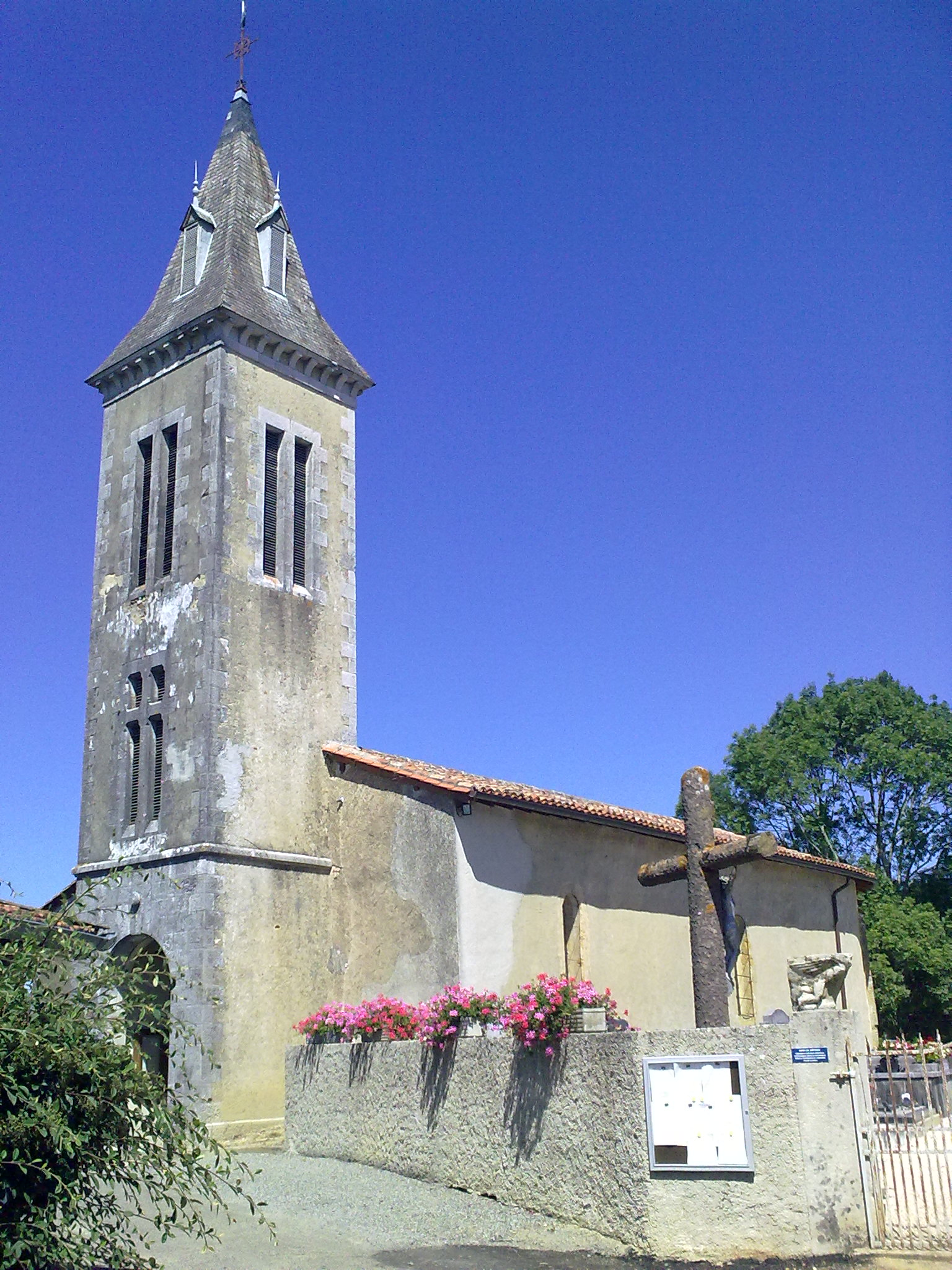 Eglise de Bassercles le 18 juillet 2010, France.